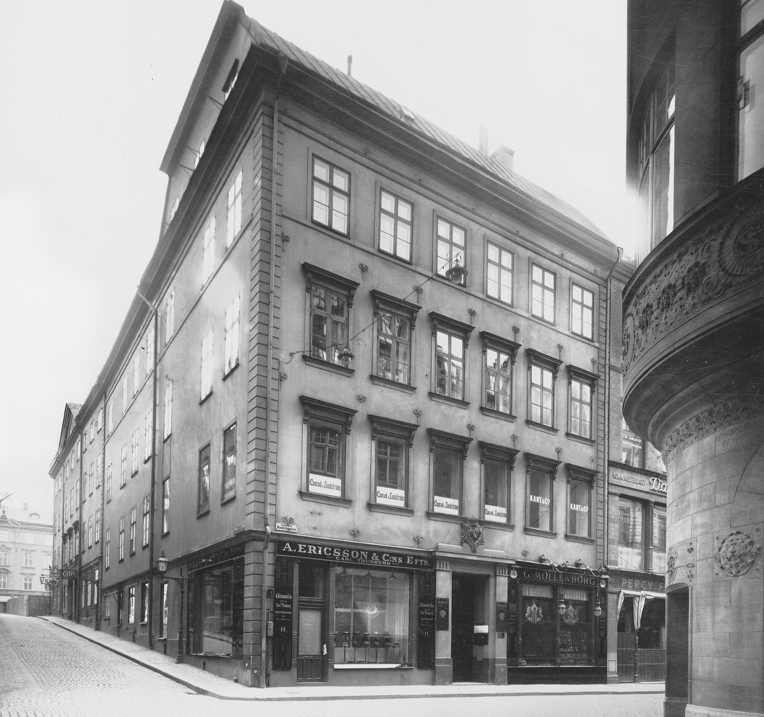 Fagerbergska huset hörnet Drottninggatan 14 / Karduansmakargatan 3 på Norrmalm i Stockholm (revs 1928)